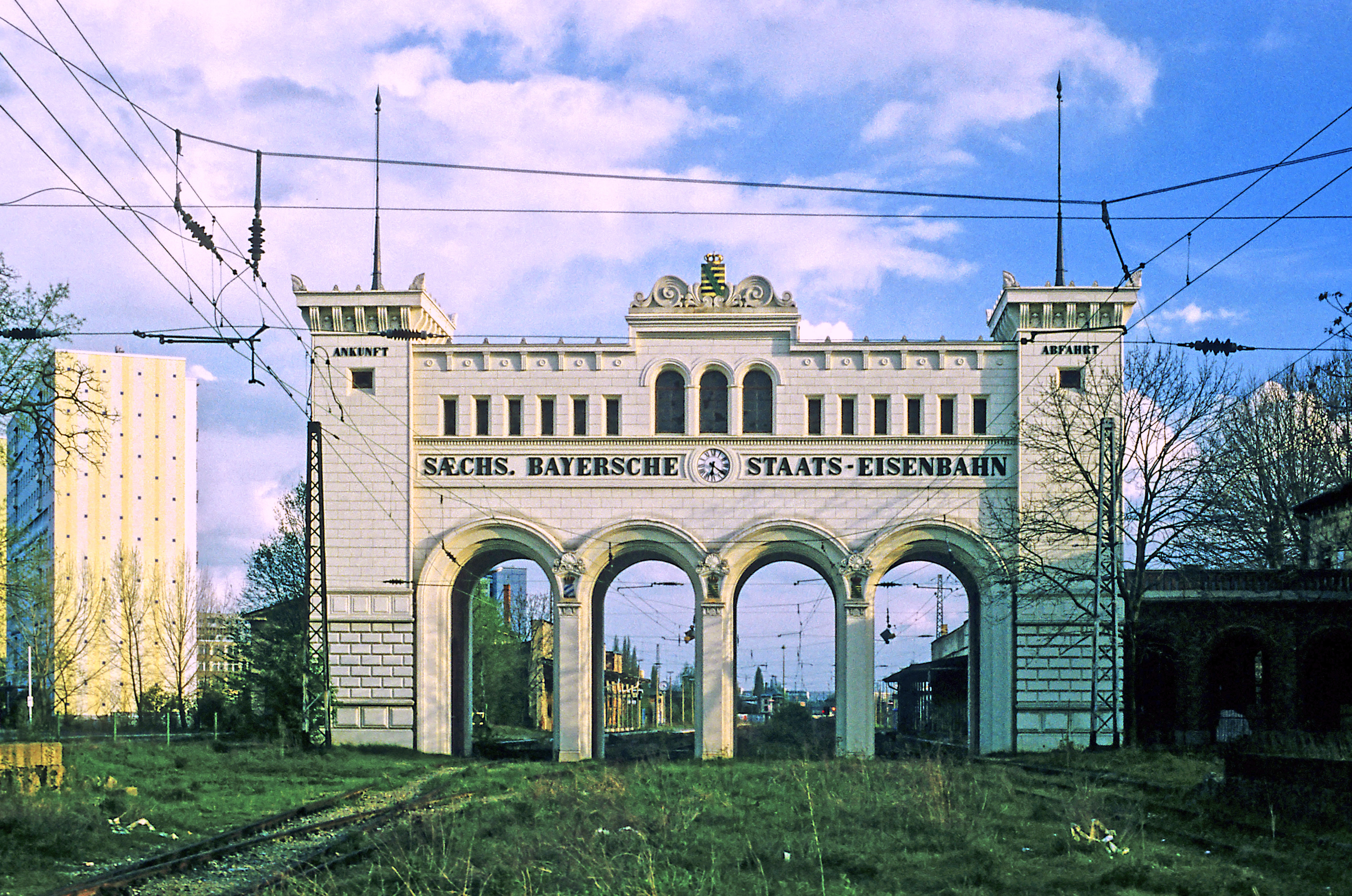 vom Ort der ehemaligen Drehscheibe. Das Gleis 6 ist bereits seit Jahrzehnten nicht mehr vorhanden.